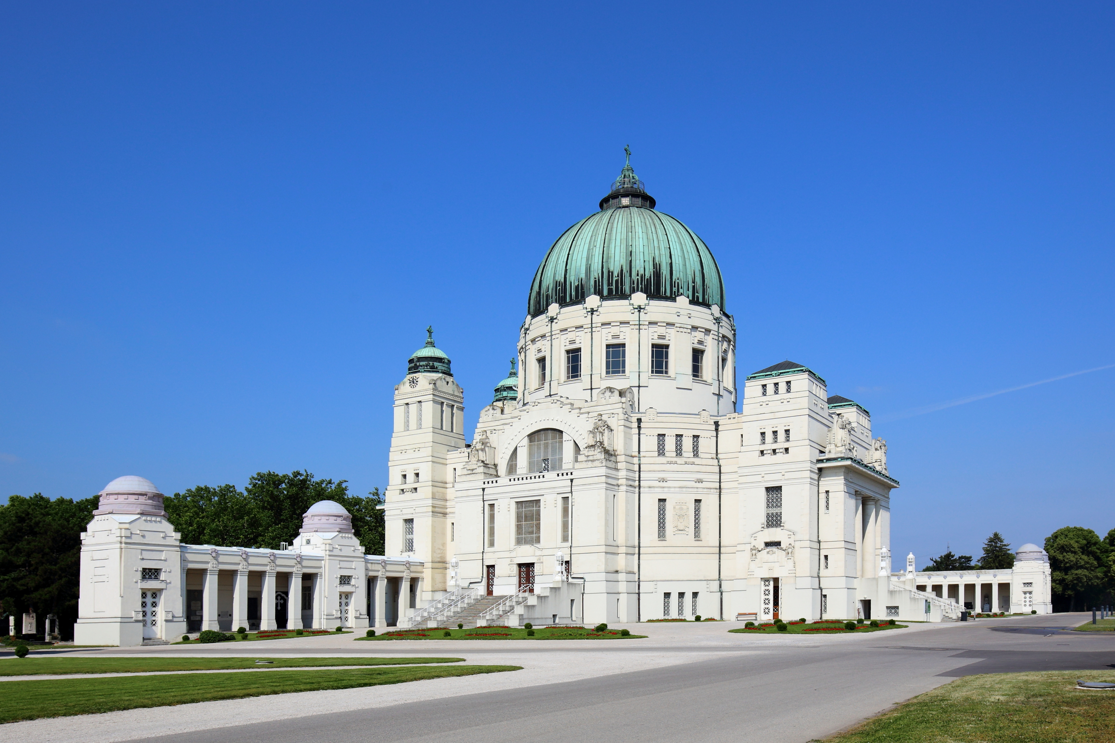 Ostansicht der römisch-katholischen Karl-Borromäus-Kirche, auch Luegerkirche (Dr.-Karl-Lueger-Gedächtniskirche) bezeichnet, am Zentralfriedhof im 11. Wiener Gemeindebezirk Simmering. Die Kirche wurde von 1908 bis 1911 nach Entwürfen des Architekten Max Hegele errichtet. Ende Oktober 1910 wurden die sterblichen Überreste des Wiener Bürgermeister Karl Lueger in der Kirchengruft unter dem Hochaltar beigesetzt.